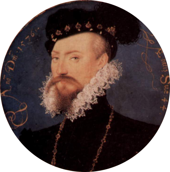 Porträt des Robert Dudley, Earl of Leicester, Tondo